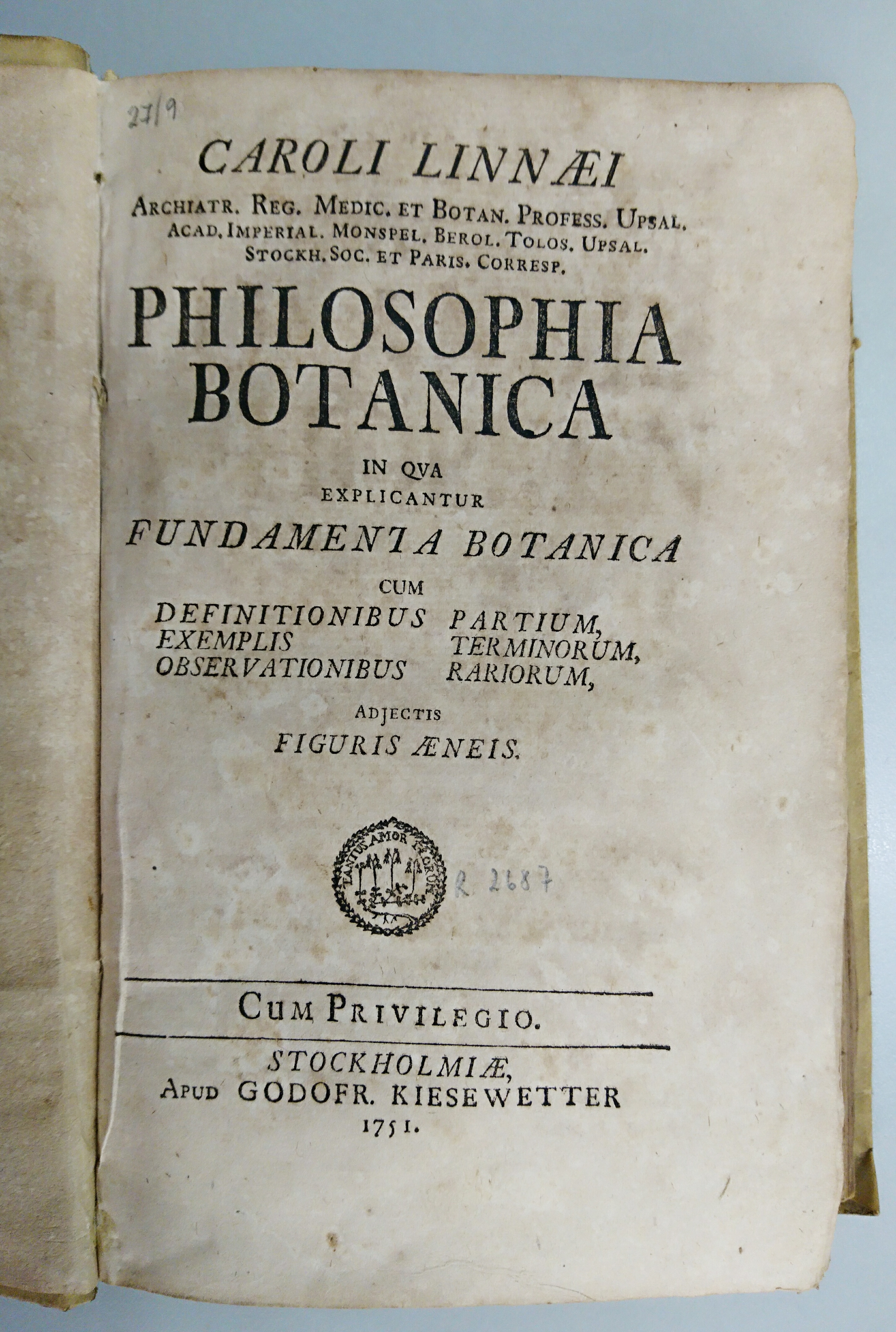 Portada de la primera edición de Philosophia Botanica de Carl von Linné (ejemplar del Jardí Botànic Marimurtra)